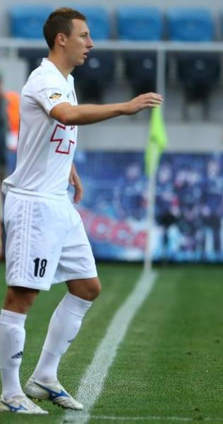 Сергій Логінов - футболіст Волині